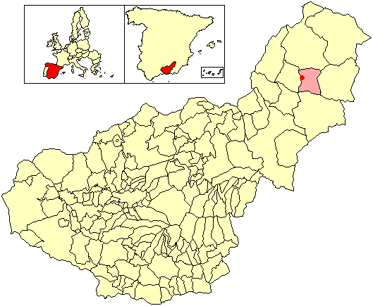 Situación de la localidad de Cortijos del Cura (en el municipio de Galera) respecto a la provincia de Granada, en España.